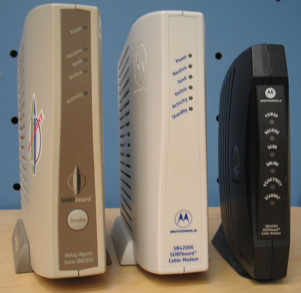 Modem kablowy stosowany w sieciach kablowych do przesyłania danych (zwykle do realizowania dostępu do Internetu), kilka różnych wersji wraz z modelem Relay Agent dla inżynierów (model serwisowy).